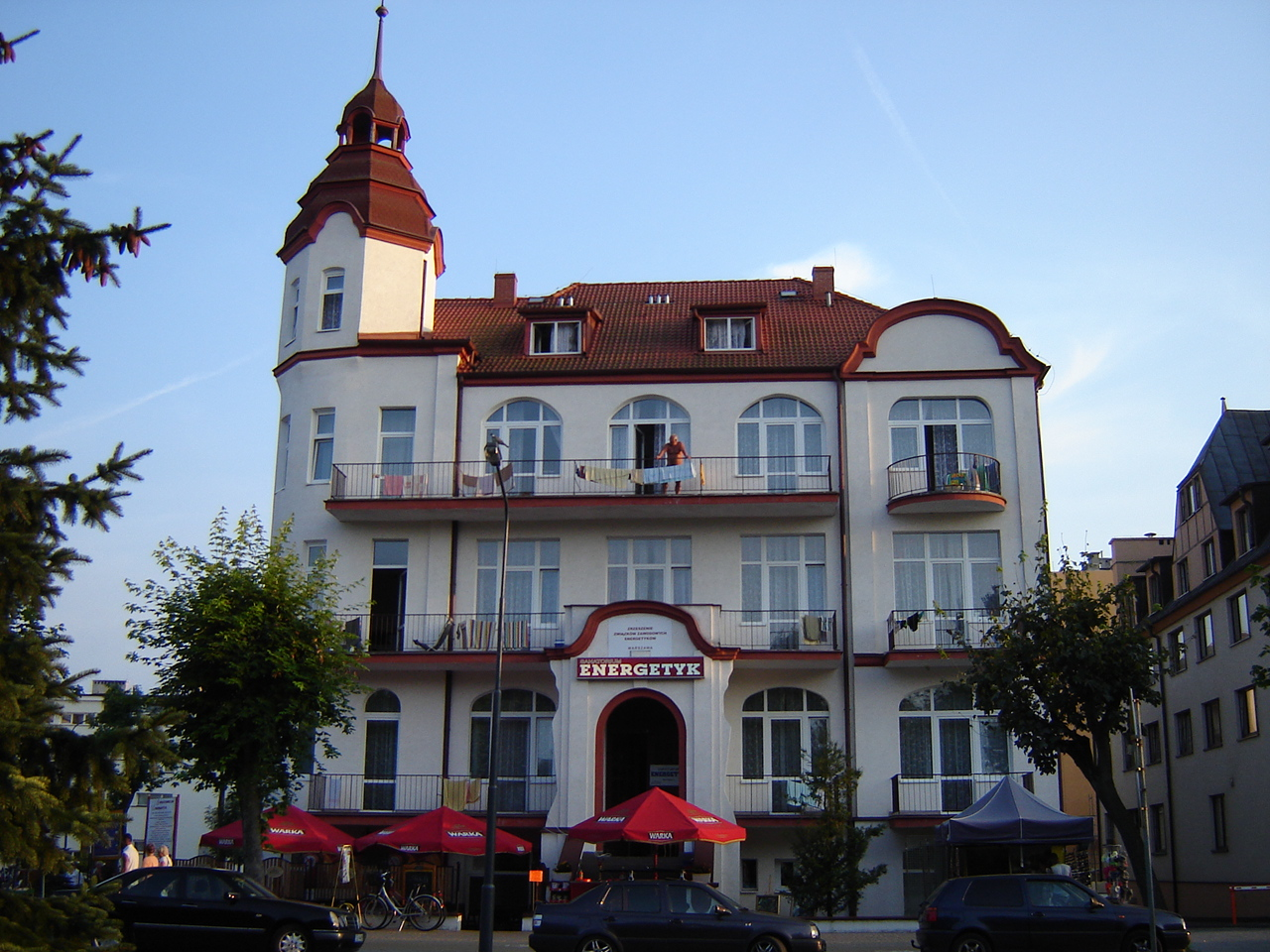 Dom Uzdorwiskowy "Energetyk" w Świnoujściu.